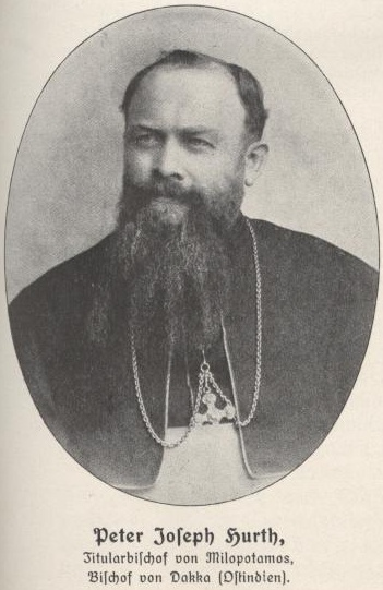 Peter Joseph Hurth (1857-1935) deutschstämmiger Missionsbischof in Britisch-Indien und auf den Philippinen